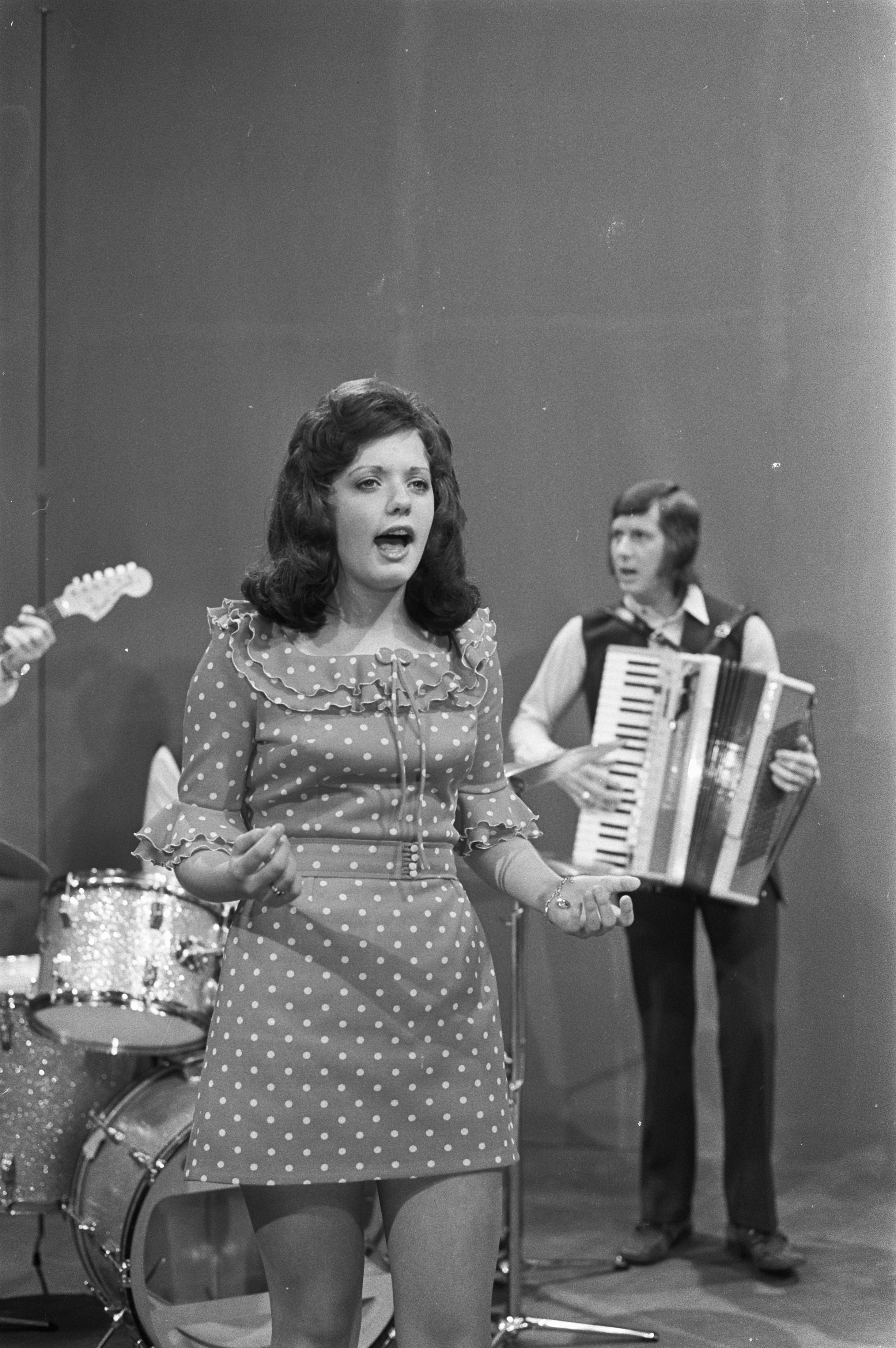 Collectie / Archief : Fotocollectie Anefo Reportage / Serie : [ onbekend ] Beschrijving : TV-programma Op Losse Groeven , Hanny en de Rekels Datum : 16 augustus 1972 Trefwoorden : TV-programmas, zangeressen Instellingsnaam : Op Losse Groeven Fotograaf : Punt, […] / Anefo Auteursrechthebbende : Nationaal Archief Materiaalsoort : Negatief (zwart/wit) Nummer archiefinventaris : bekijk toegang 2.24.01.05 Bestanddeelnummer : 925-8118